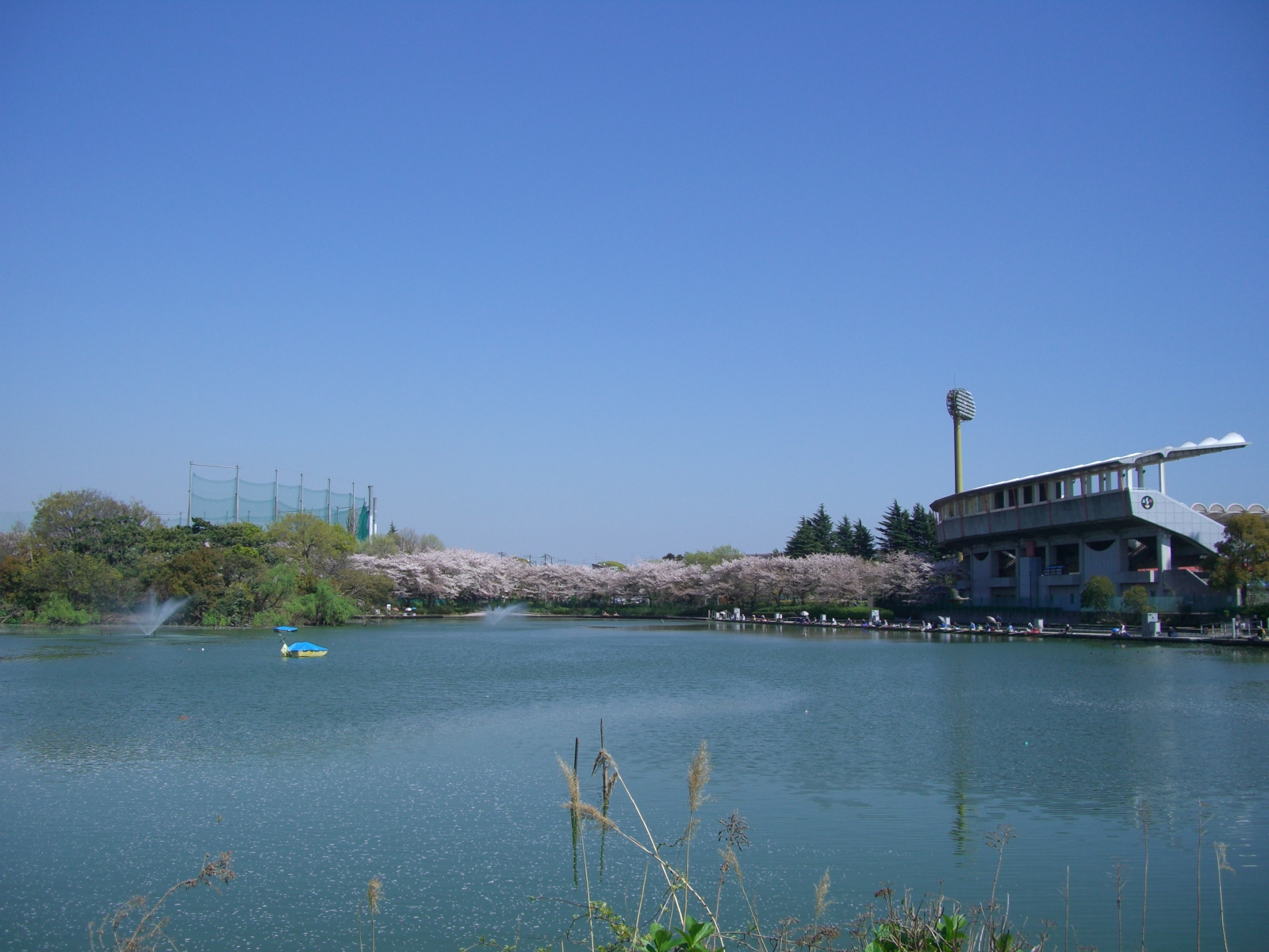 等々力緑地 釣り池